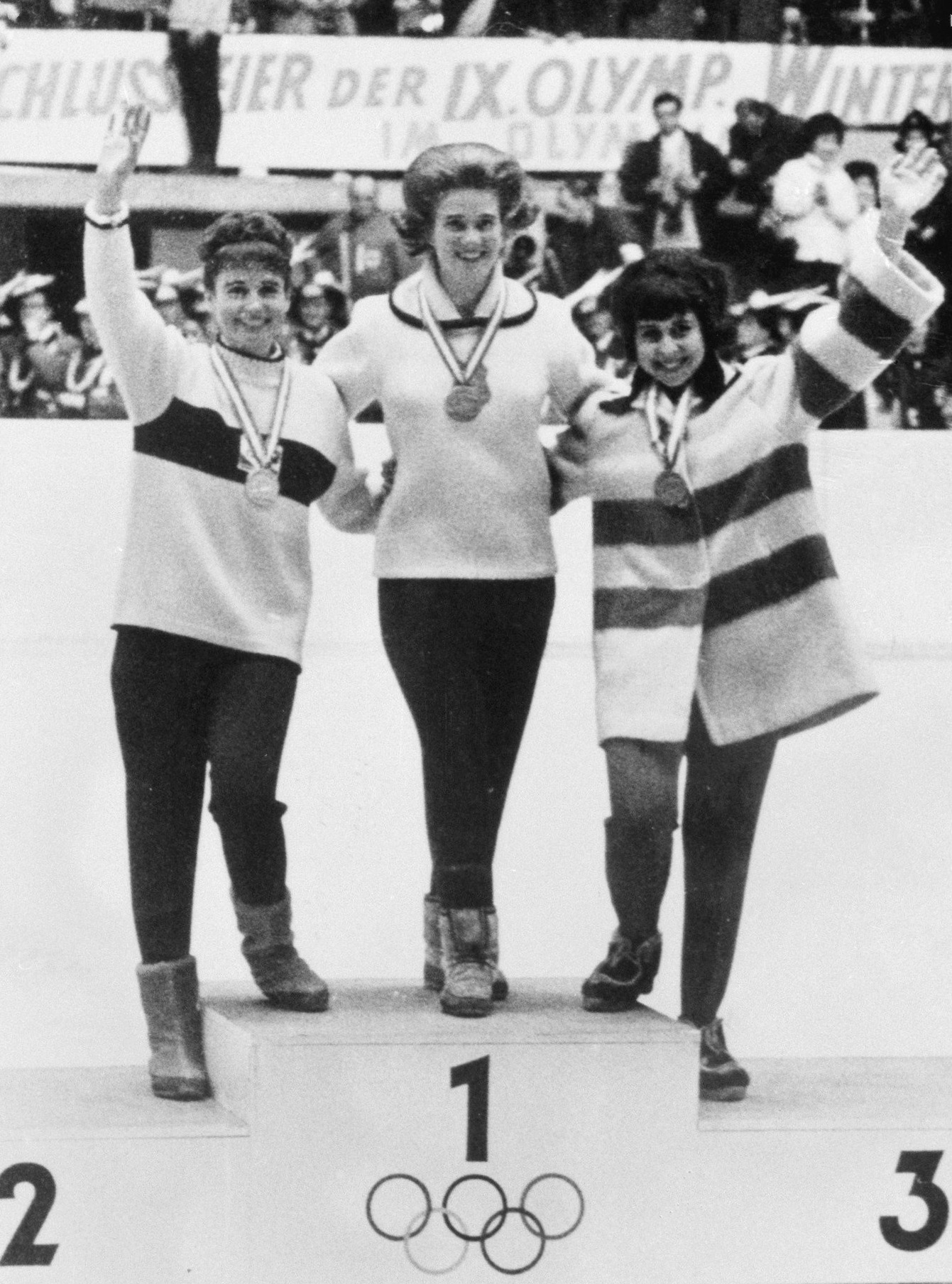 Sjoukje Dijkstra op het erepodium met links Regina Heitzer en rechts Petra Burka